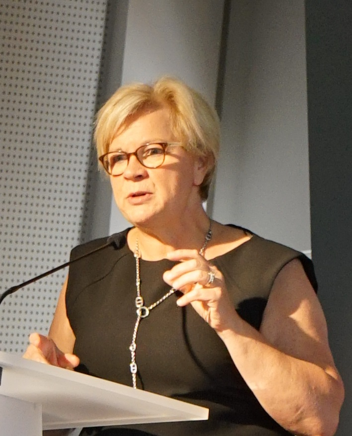 Catherine Vautrin lors des rencontres de l' URIOPS à Reims.